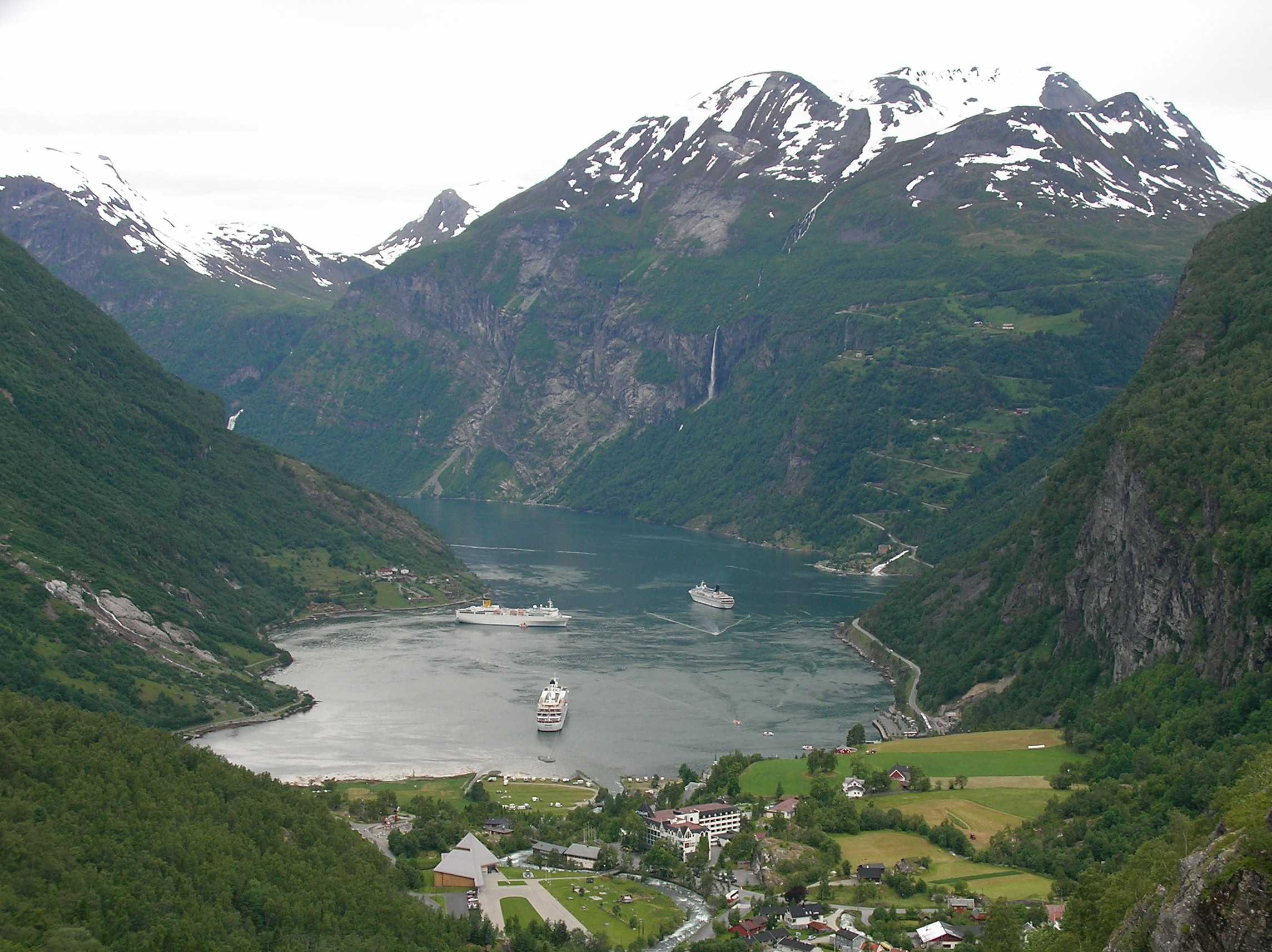 Das Ostende des Geirangerfjords in der Übersicht